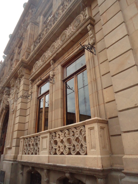 Fachada del Museo de la Máscara En San Luis Potosí México